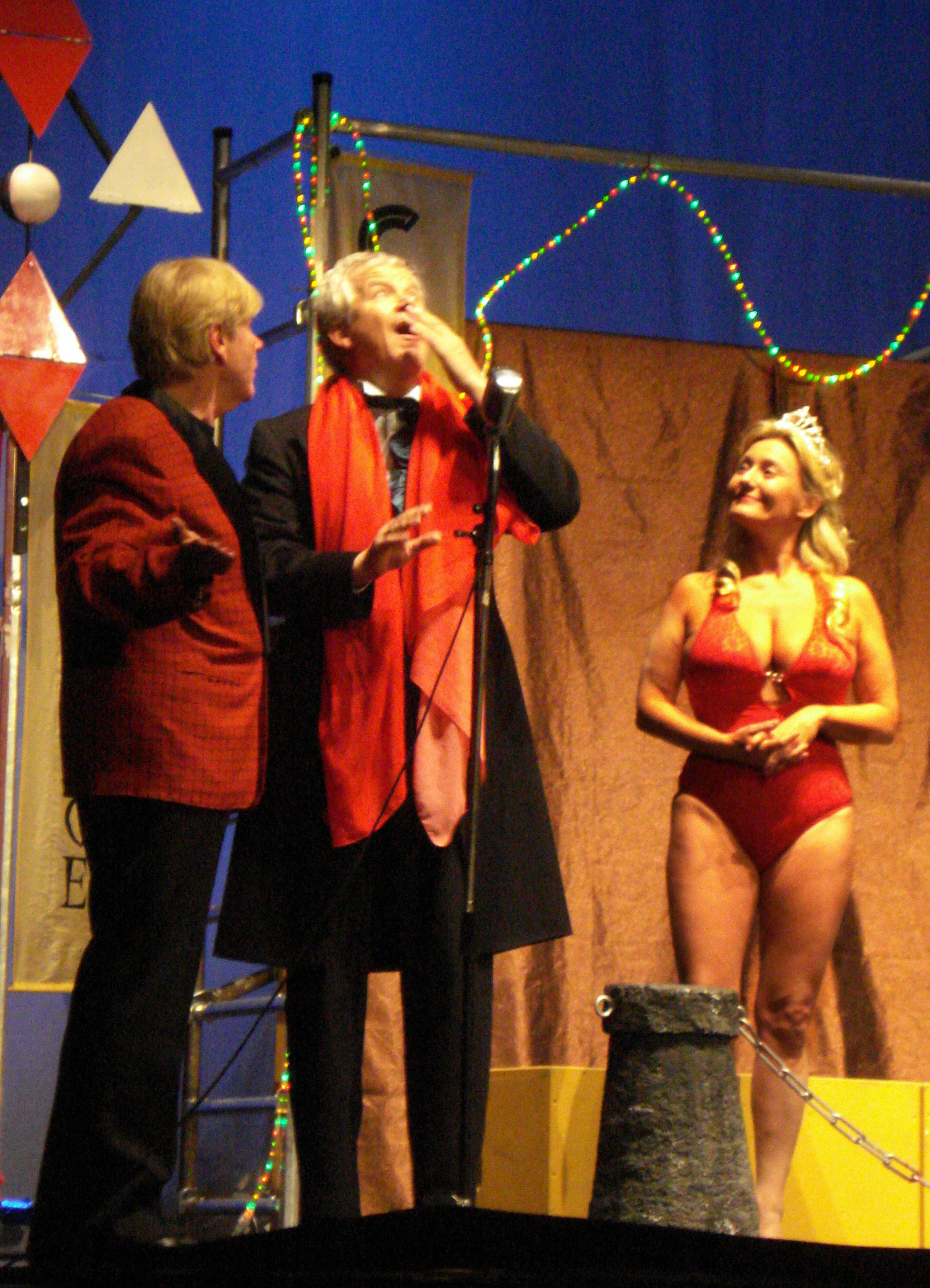 Wir sind noch einmal davongekommen – Wels – 09/2008